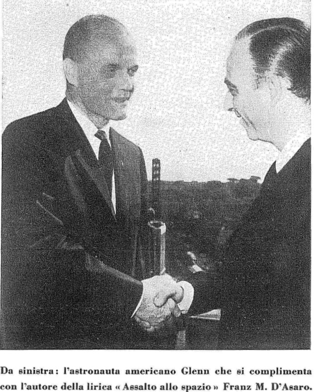 Franz Maria d'Asaro, giornalista e poeta italiano, e John Glenn, astronauta americano